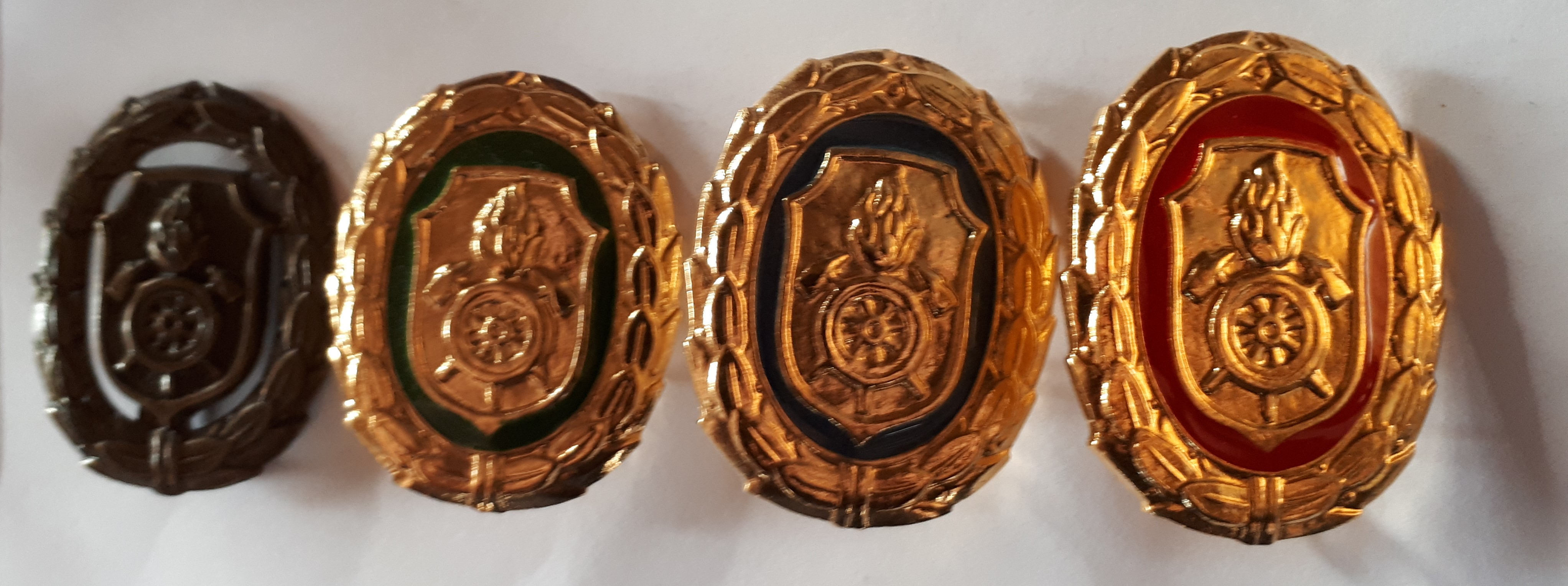 Die Leistungabzeichen- Die Gruppe im Löscheinsatz Bronze Gold-Grün Gold-Blau Gold-Rot Silber und Gold fehlen